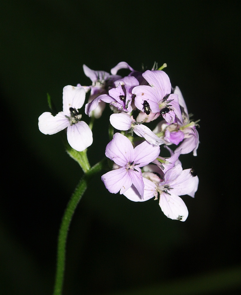 Lunaria rediviva, Hohenloher Land, Baden-Württemberg, Germany